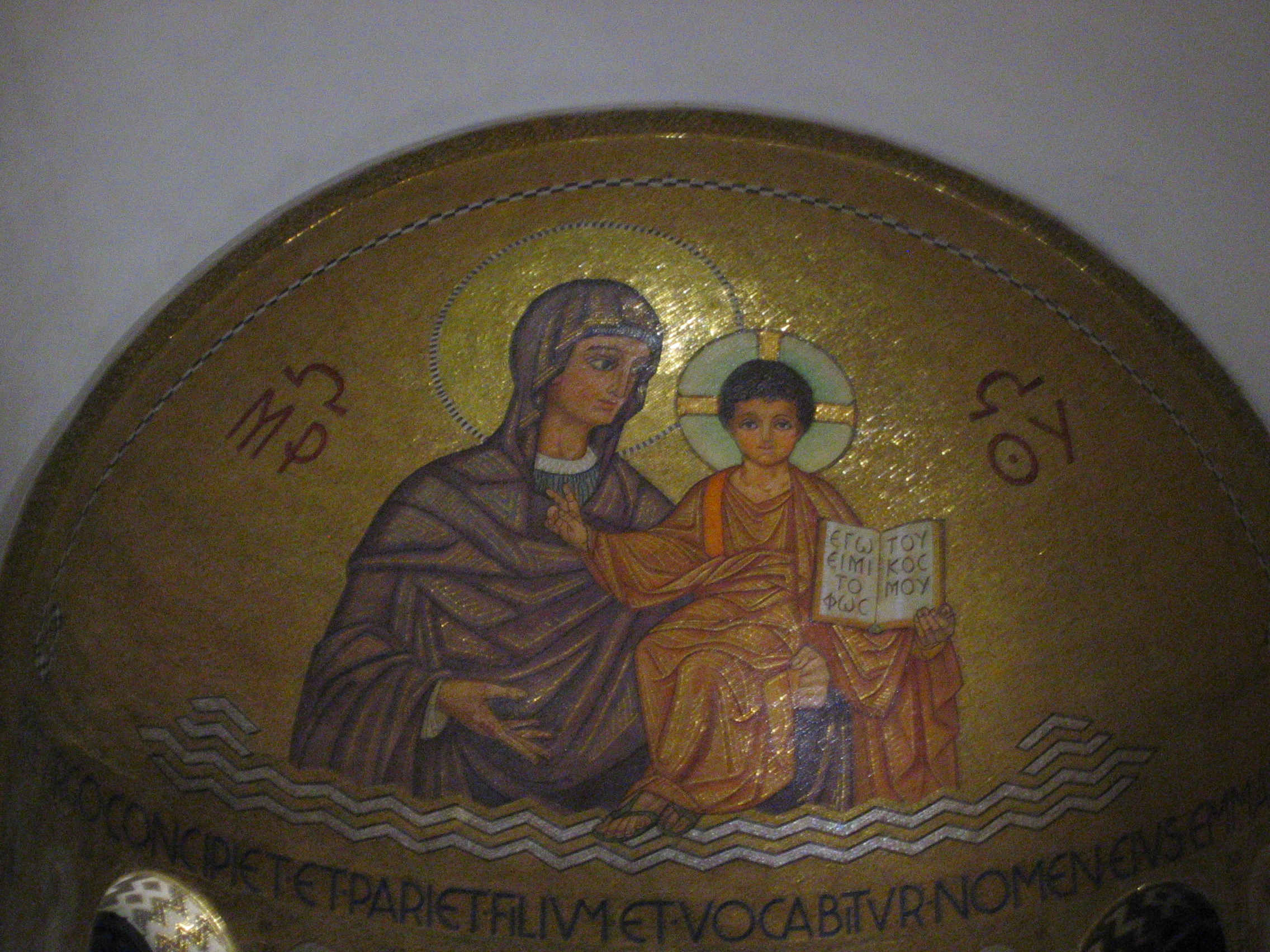 Dormitio Church in Jerusalem